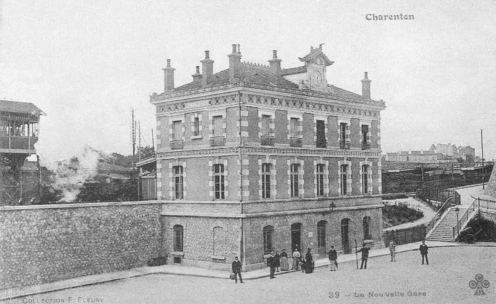 Ancienne gare de Charenton (Val-de-Marne - France), au début du XX° siècle.